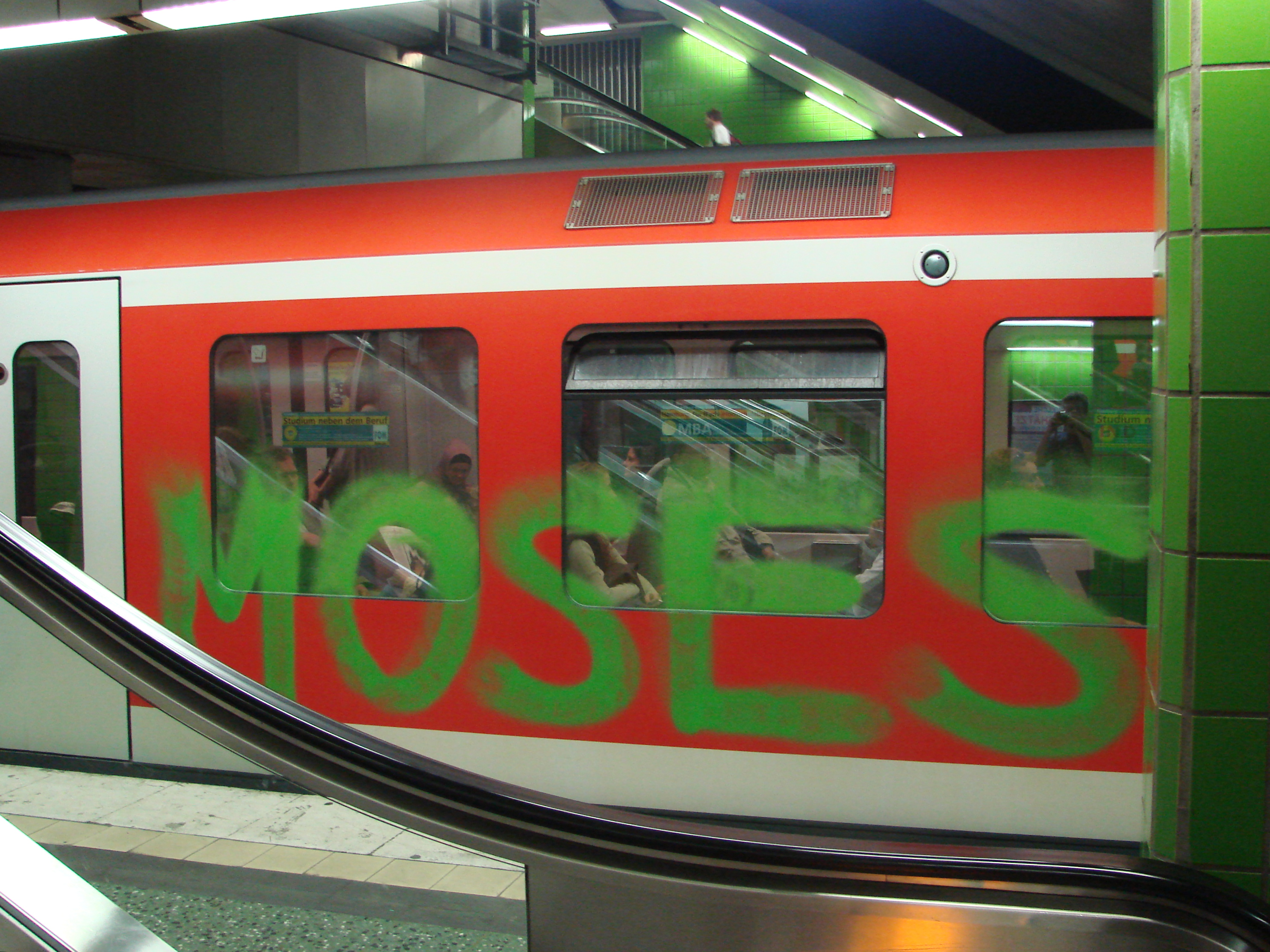 Graffiti von Moses auf einer S-Bahn, 2007